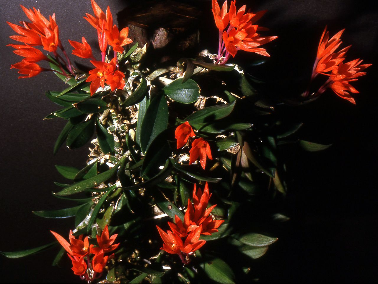 Alamania punicea - plant